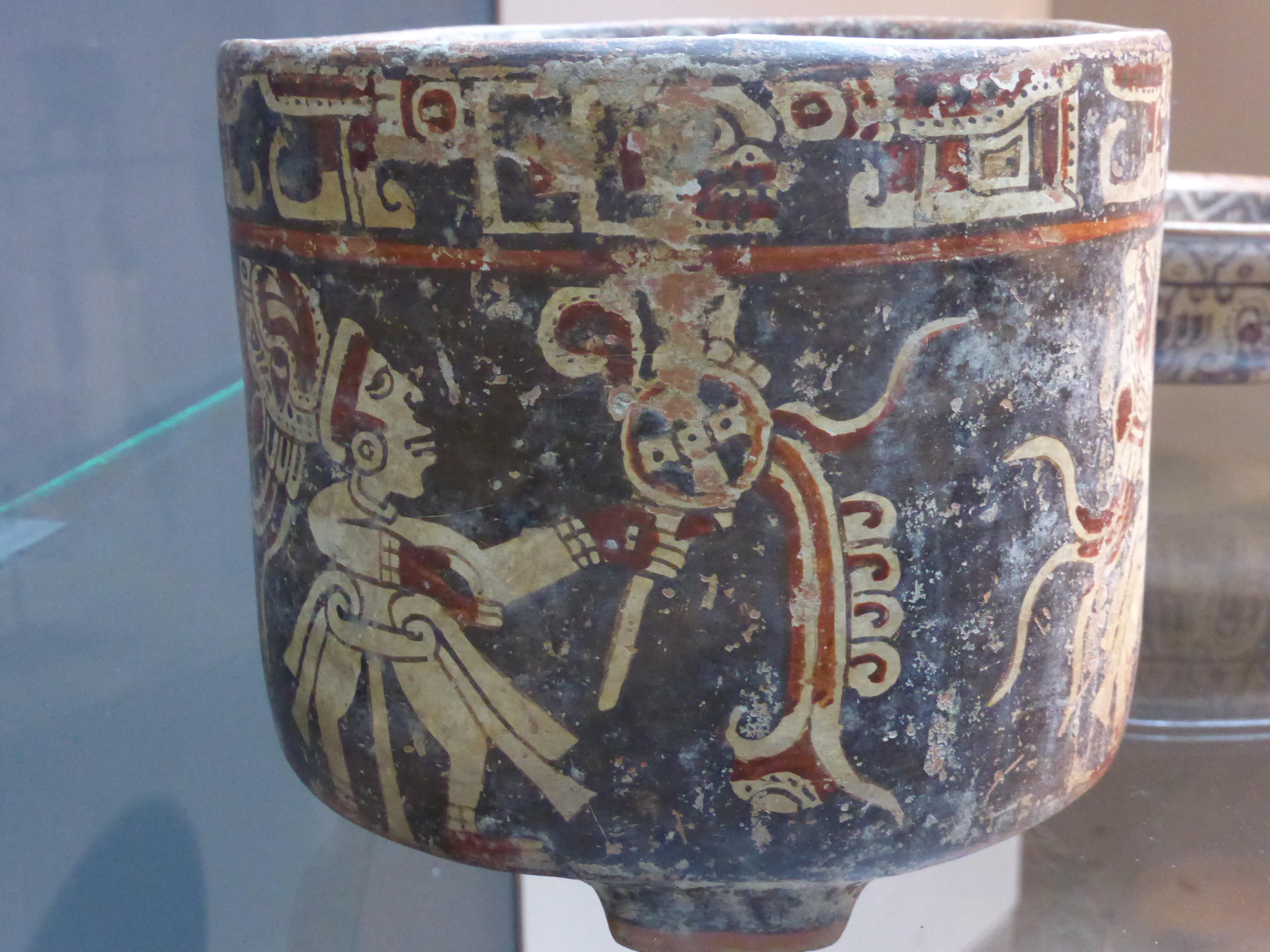 En territorios cercanos a la frontera maya, al oeste de Honduras, entre los años 600 y 900 d. C., se desarrolló una alfarería con influencia maya. Este vaso trípode está inventariado con el número 0414 en el Museo Chileno de Arte Precolombino, en la ciudad de Santiago de Chile.